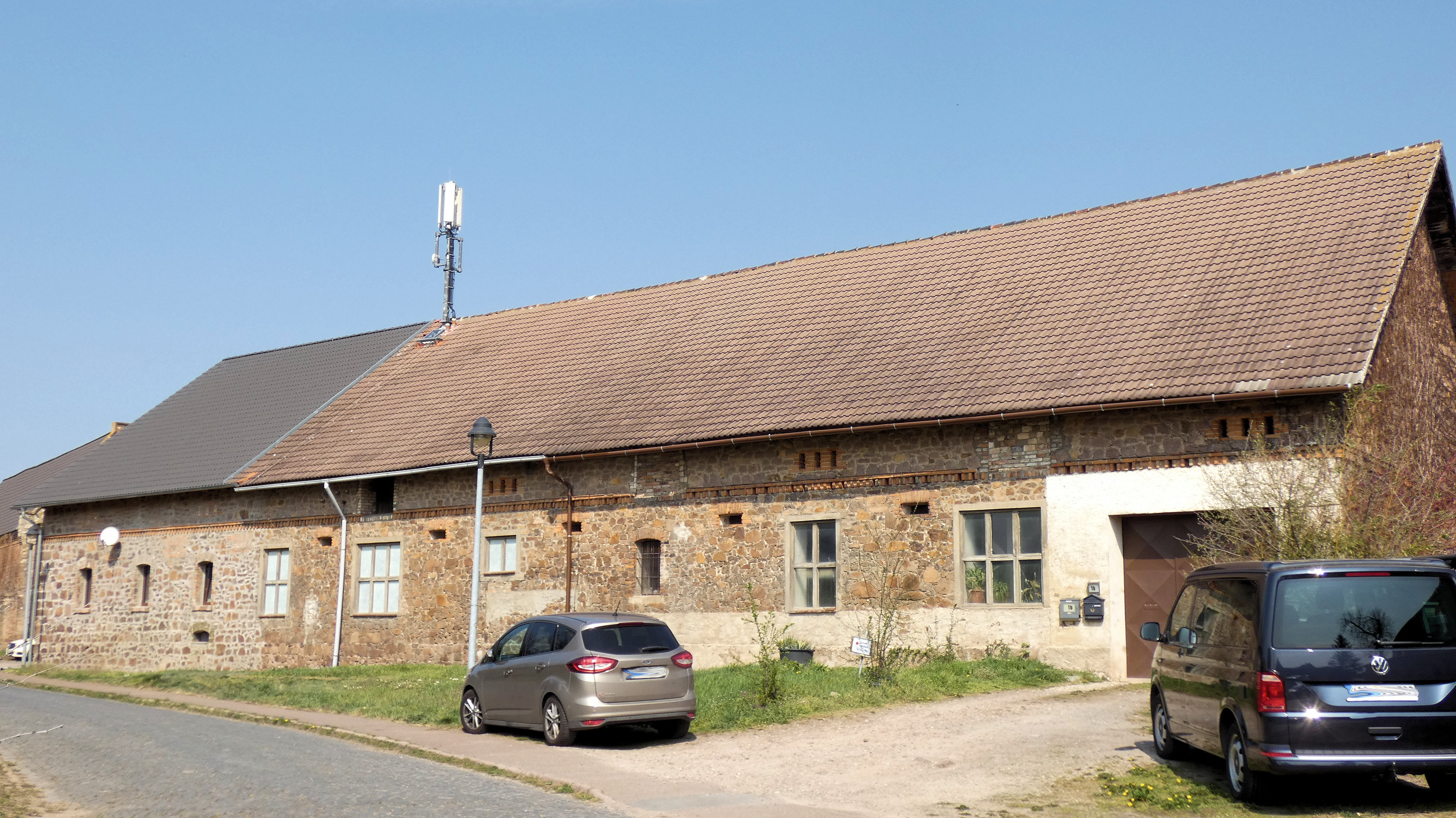 Halle-Lettin, Inselstraße 1b, Domäne Lettin